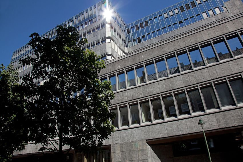 RSGV-Gebäude in Düsseldorf